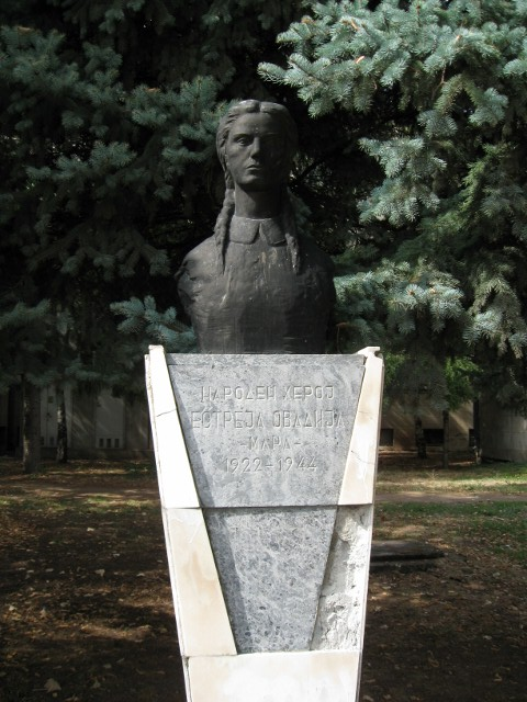 פרוטומה של אסתר עובדיה בעיר ביטולה, רפובליקה של מקדוניה